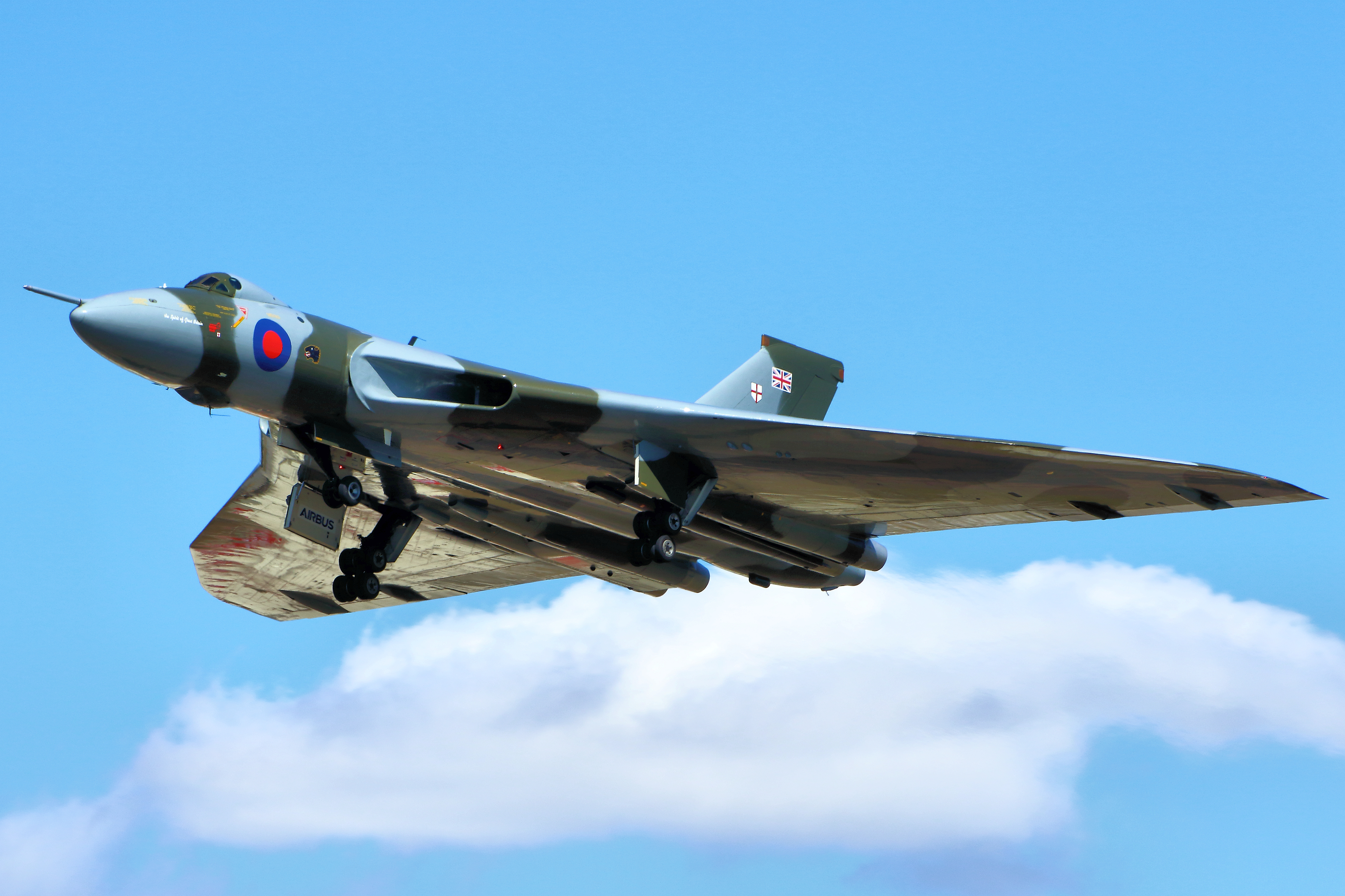 Vulcan - RIAT 2015